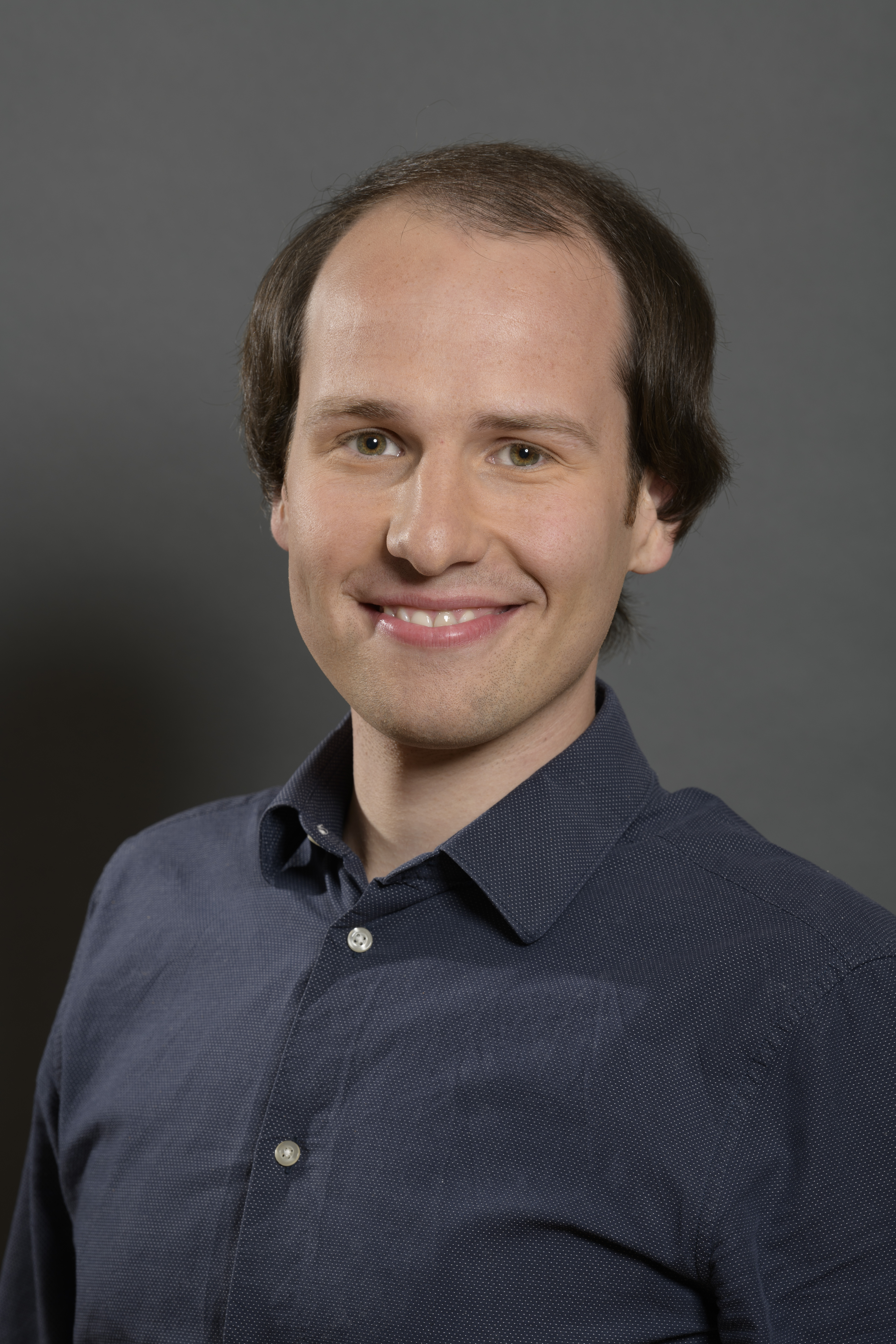 Tim Pargent - Foto: Stefan M. Prager für Fraktion Bündnis 90 / Die Grünen im Bayerischen Landtag